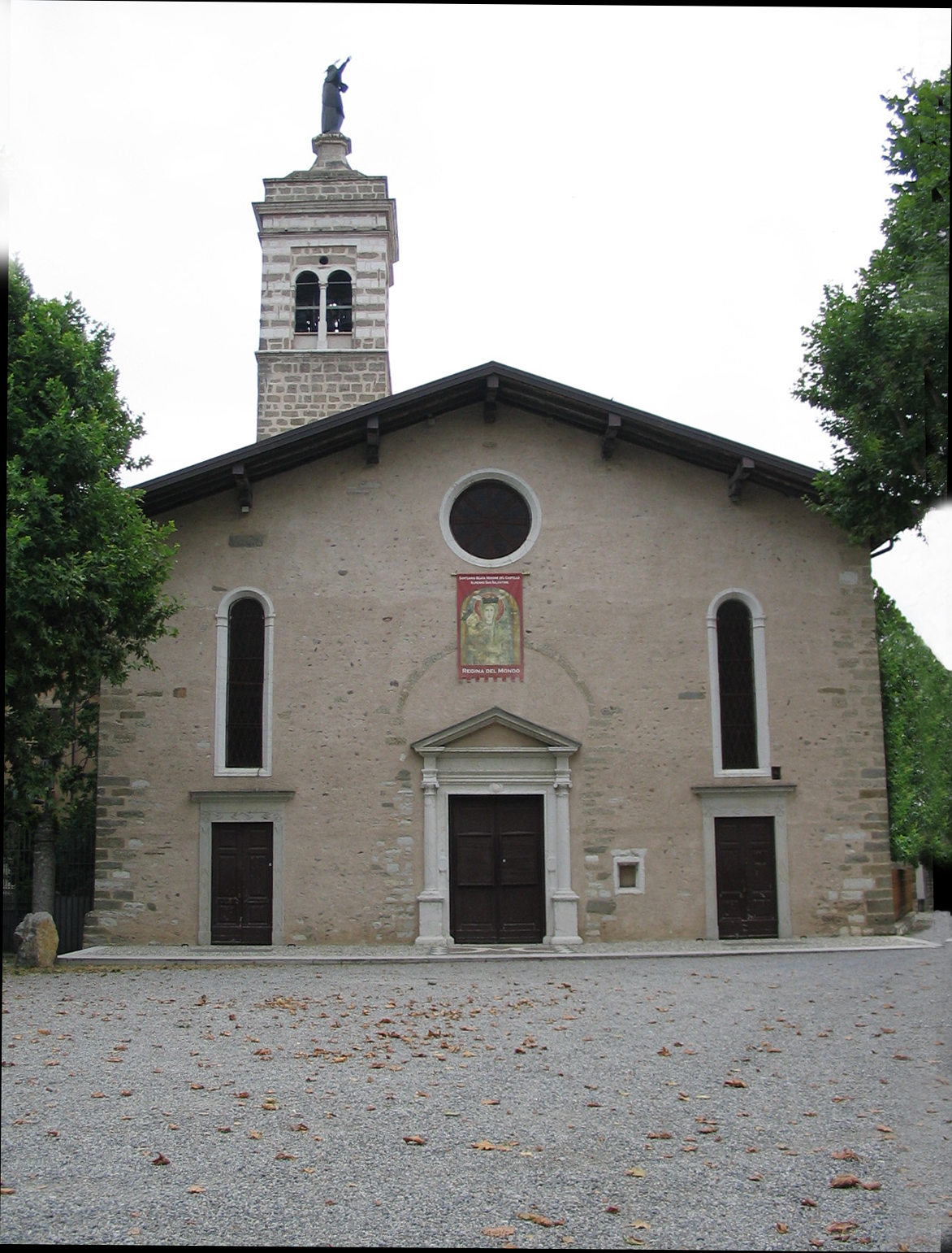 Autore Giorces. Almenno San Salvatore, Madonna del Castello.